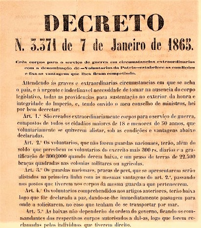 Primeira página do Decreto Imperial nº 3.371 de 7 de Janeiro de 1865 que cria o corpo de Voluntários da Pátria, em impresso da Typografia Nacional, atual Imprensa Nacional.